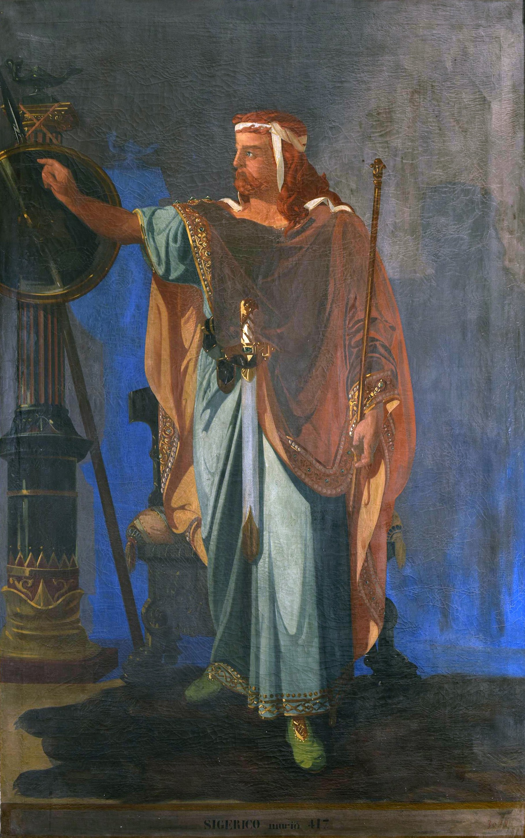 Retrato imaginario de Sigerico († 415), rey de los Visigodos y hermano del general godo Sarus. El reinado de Sigerico fue extraordinariamente breve, ya que sólo duró siete días.